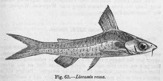 Liocassis rama = Rama rama (Hamilton, 1822)